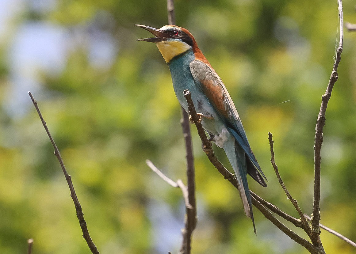 Gruccione